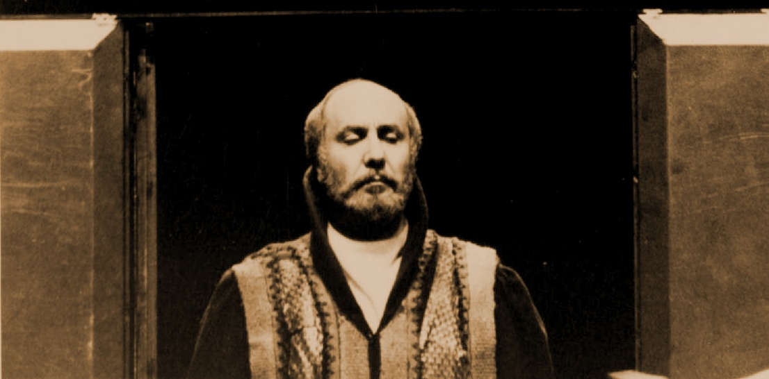 Fotografia di scena dell'Amleto di Shakespeare, andato in scena il 19 novembre 1972 al Teatro Comunale di Bolzano. Produzione Teatro Stabile di Bolzano, regia di Maurizio Scaparro, scenografie e costumi di Roberto Francia.